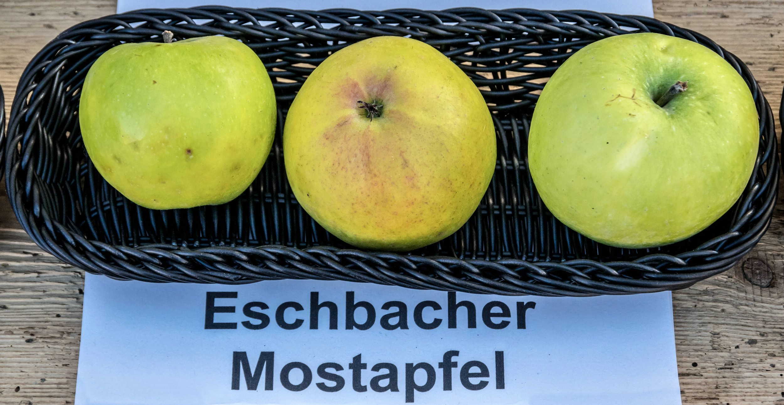 Alte Apfelsorten, von denen es im Badischen noch tragende Bäume gibt. Alle Aufnahmen au dem Oktober 2015